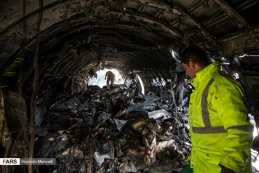 یک فروند هواپیمای باربری ۷۰۷ حامل گوشت از مبدا بیشکک کشور قرقیزستان، اقدام به فرود اضطراری در فرودگاه فتح البرز کرده که در هنگام فرود از باند خارج و پس از برخورد با دیوار انتهایی باند دچار آتش سوزی شد.